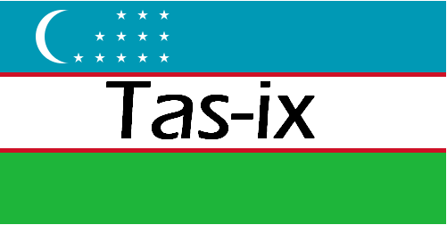 Oʻzbekcha/ўзбекча: Tas-IX